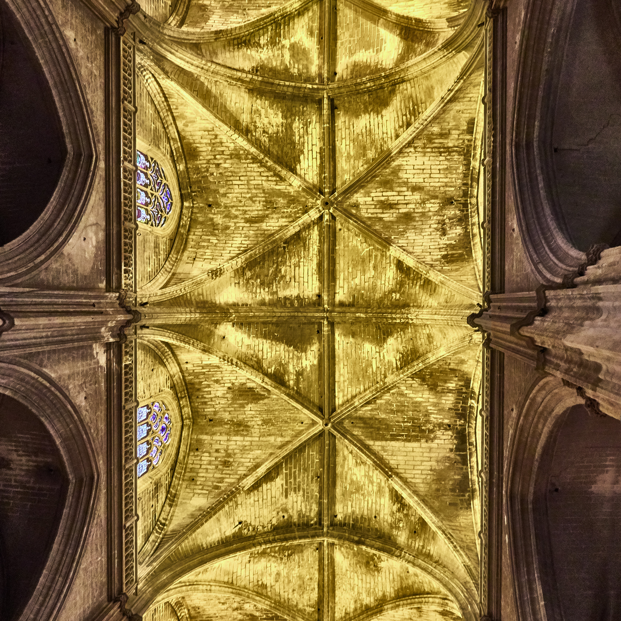 À Séville, grandiose cathédrale gothique du 15e s. Voûte de la nef principale.